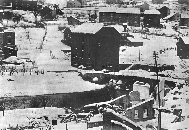 Ambleve River Bridge at Stavelot, Belgium.